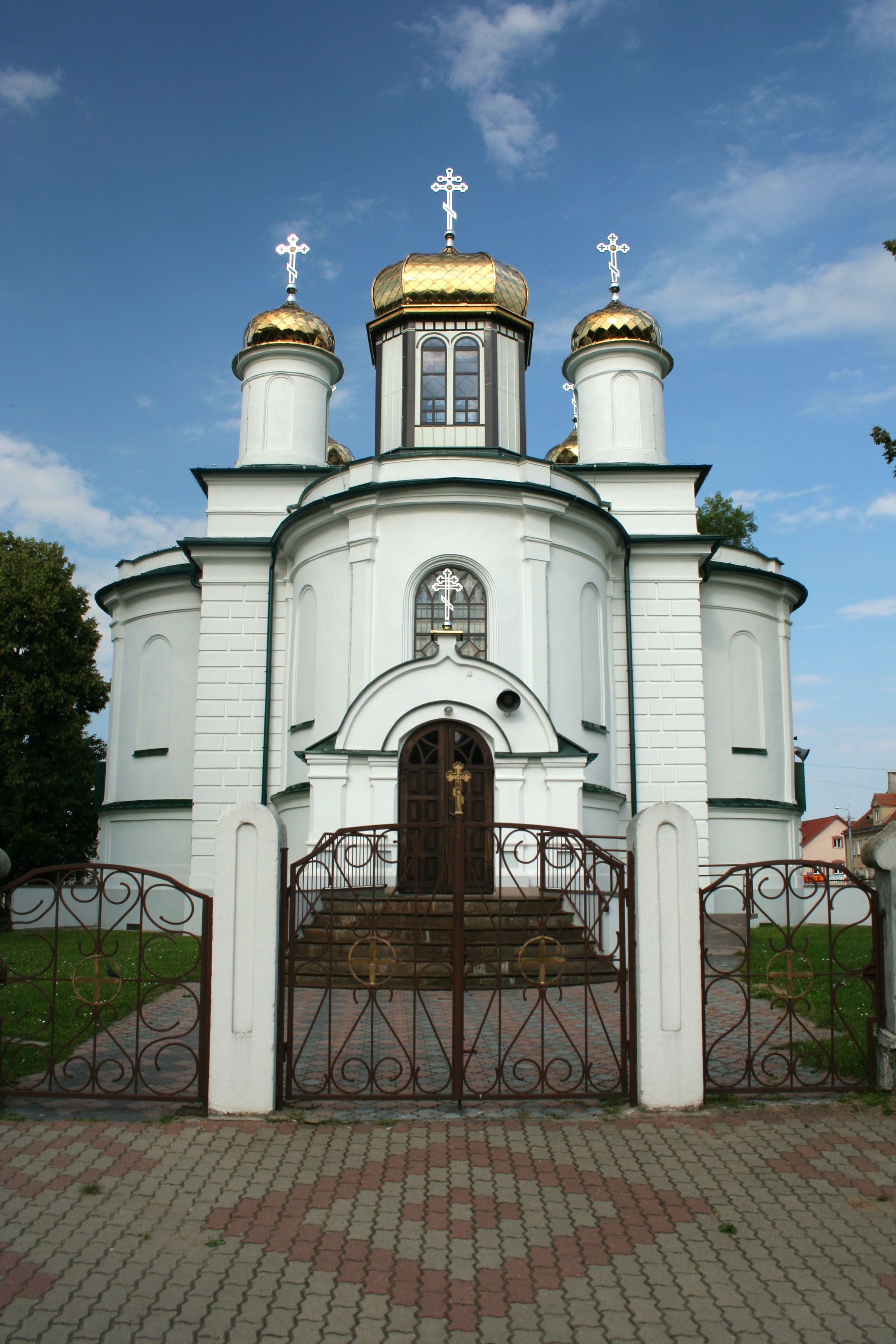 Cerkiew Aleksandra Newskiego w Sokółce.